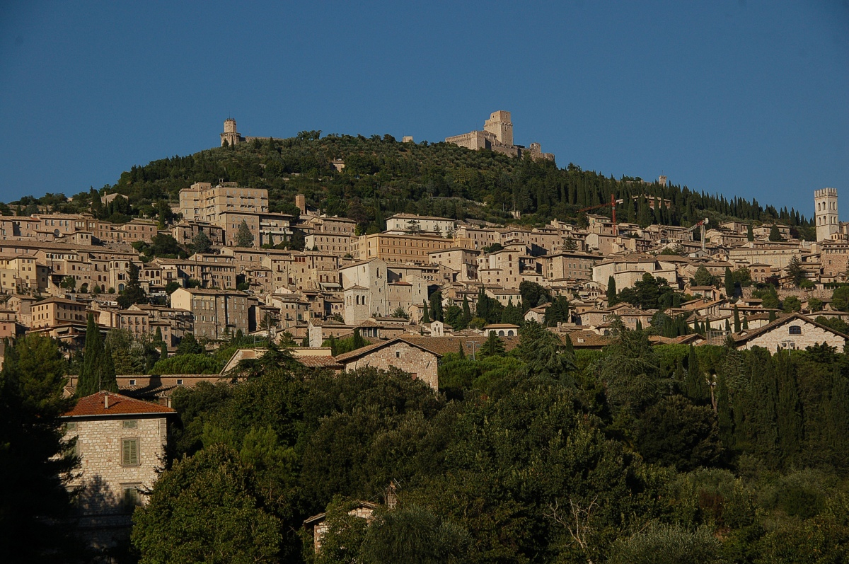 Assisi